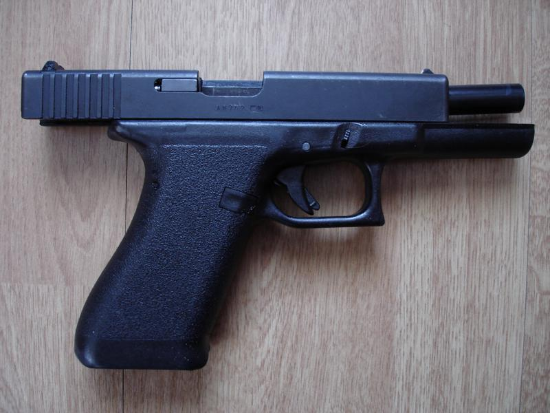 Glock 17 9mmPara (erste Ausführung - Februar 1986)